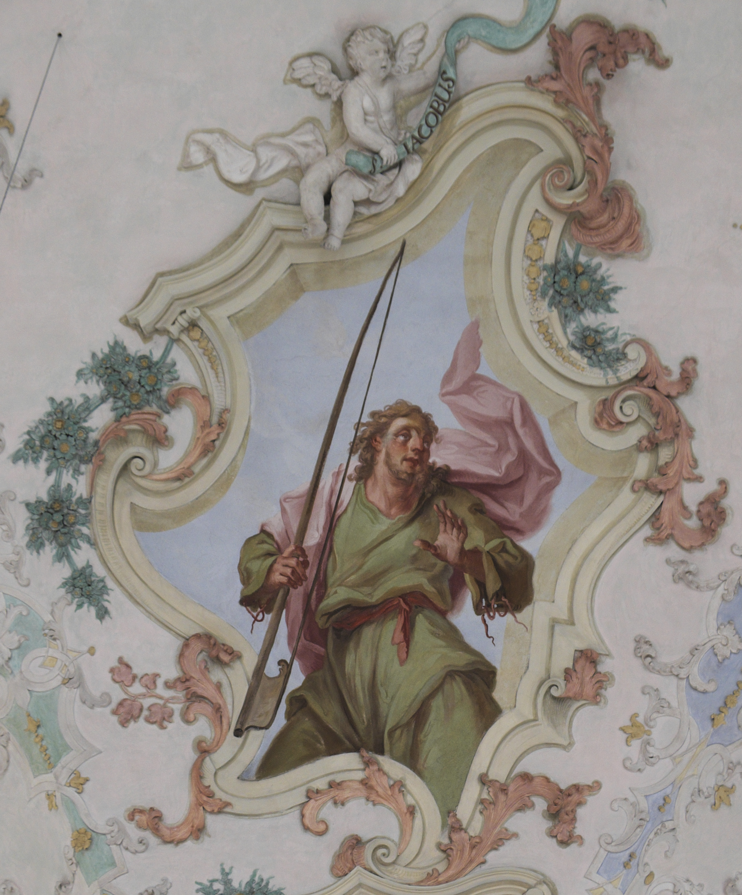 Katholische Pfarrkirche St. Martin Marktoberdorf im Landkreis Ostallgäu (Bayern/Deutschland), Deckenfresken, Apostelbilder von Balthasar Riepp